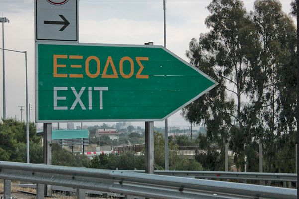 Exit sign English-Greek in Greece